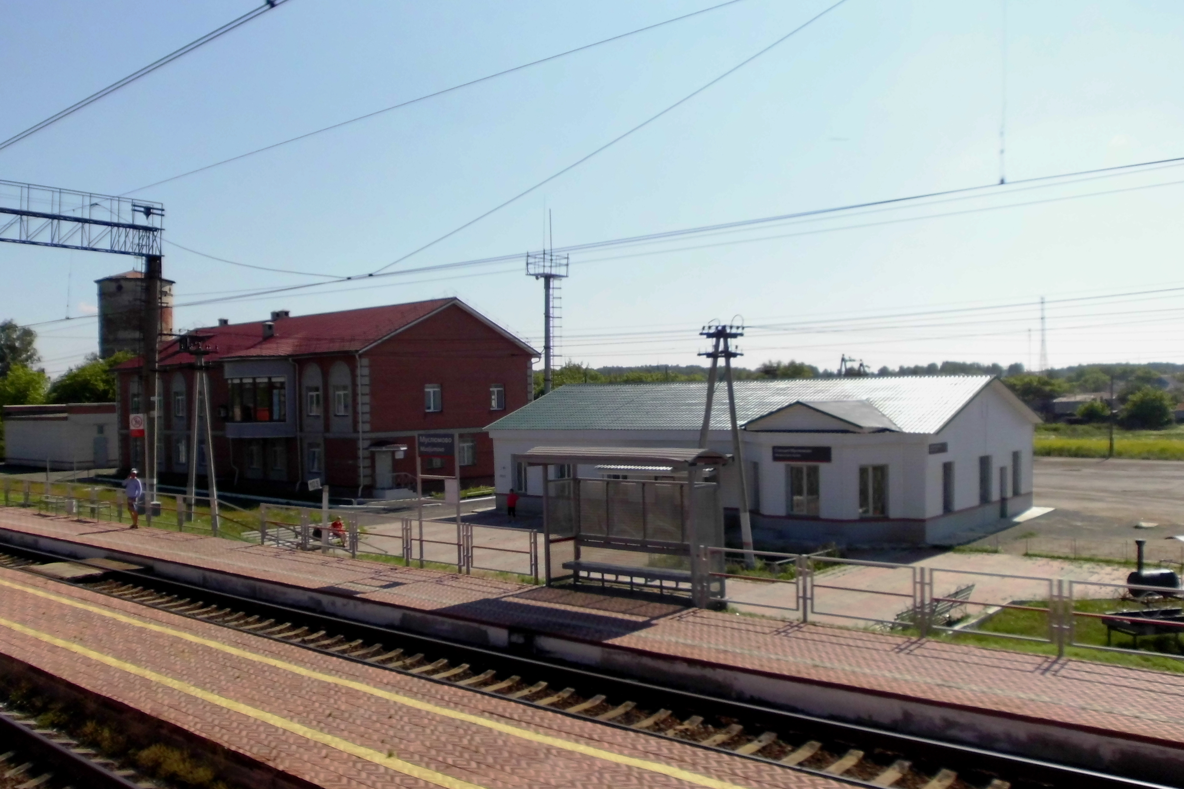 Железнодорожная станция Муслюмово Южно-Уральской железной дороги. Расположена в посёлке Муслюмово Кунашакского района Челябинской области.